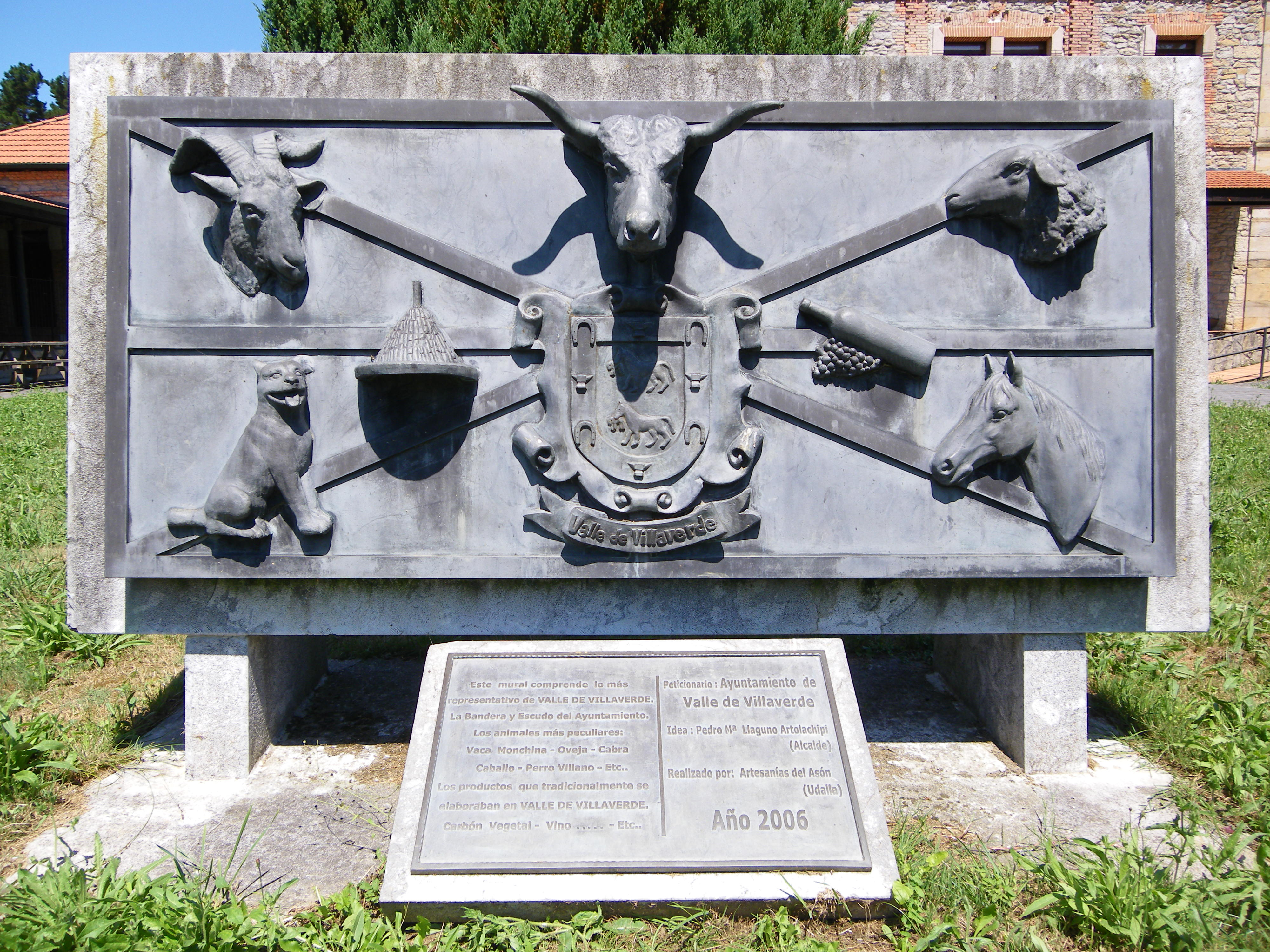 Villaverde Harana udalerriaren erakusgarrienaz osaturiko metalezko irudia. Bertan honako hauek agertzen dira: armarria, bandera, montxina behia, ardia, ahuntza, zaldia, Billano txakurra eta iraganean herritarrek ekoizten zituzten ardoa eta landare-ikatza.